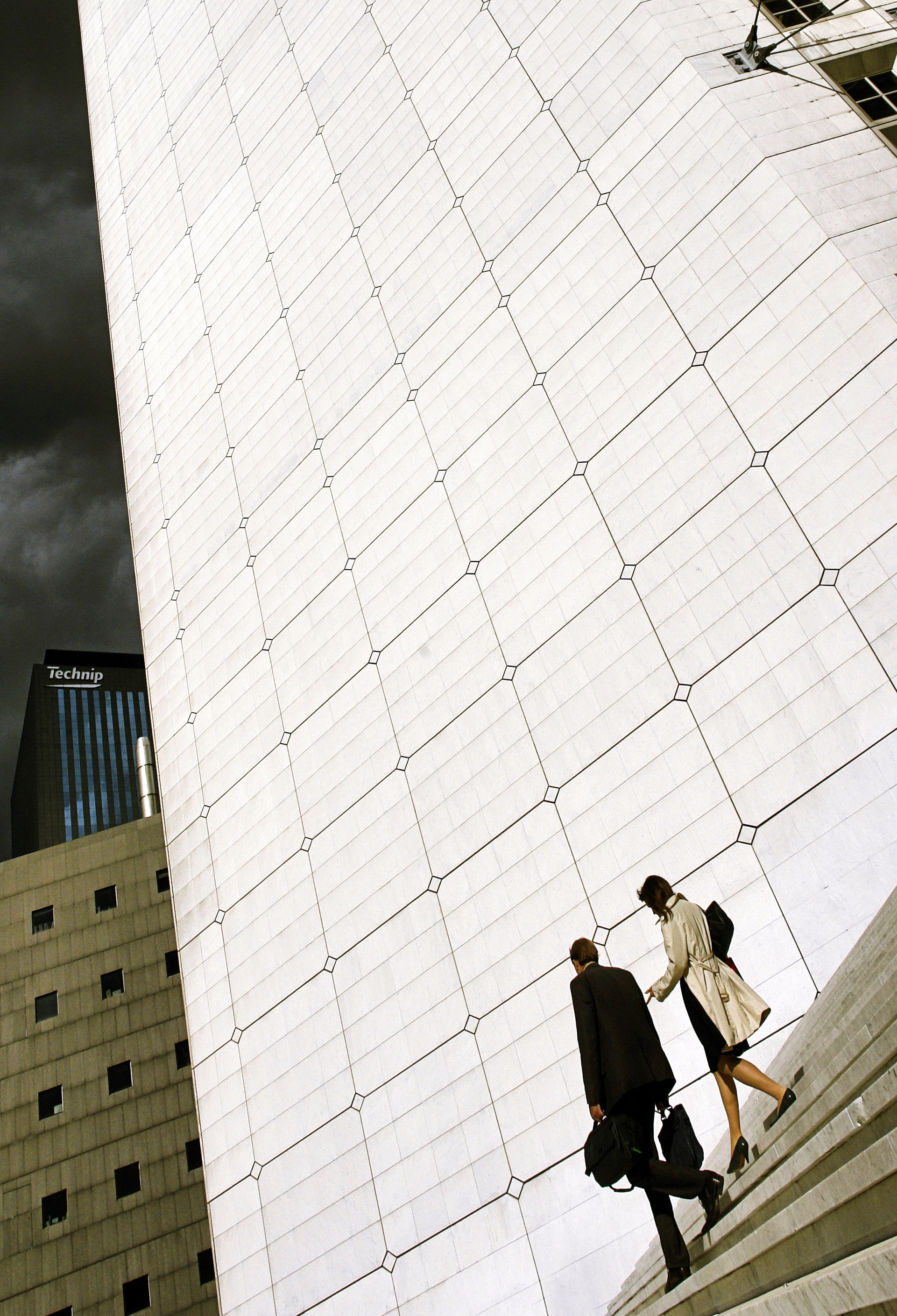 Grande Arche, La Defense